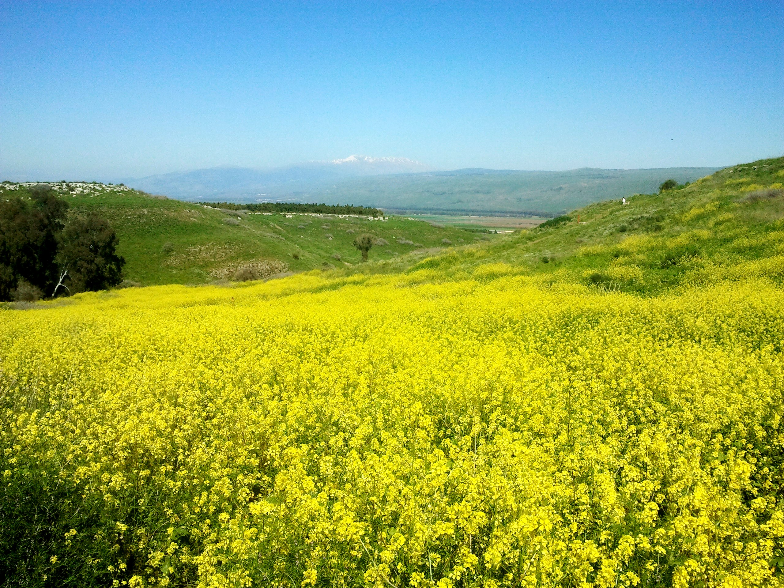 נחל מחניים זורם בגליל העליון, מהווה את גבולה הצפוני של רמת כורזים. בנחל נובע מעיין עין ירדה ליד חירבת ירדה. שדה של חרדל השדה